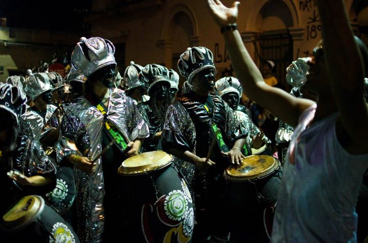 Agrupación Lubola Mi Morena en el Desfile de Llamadas 2012.